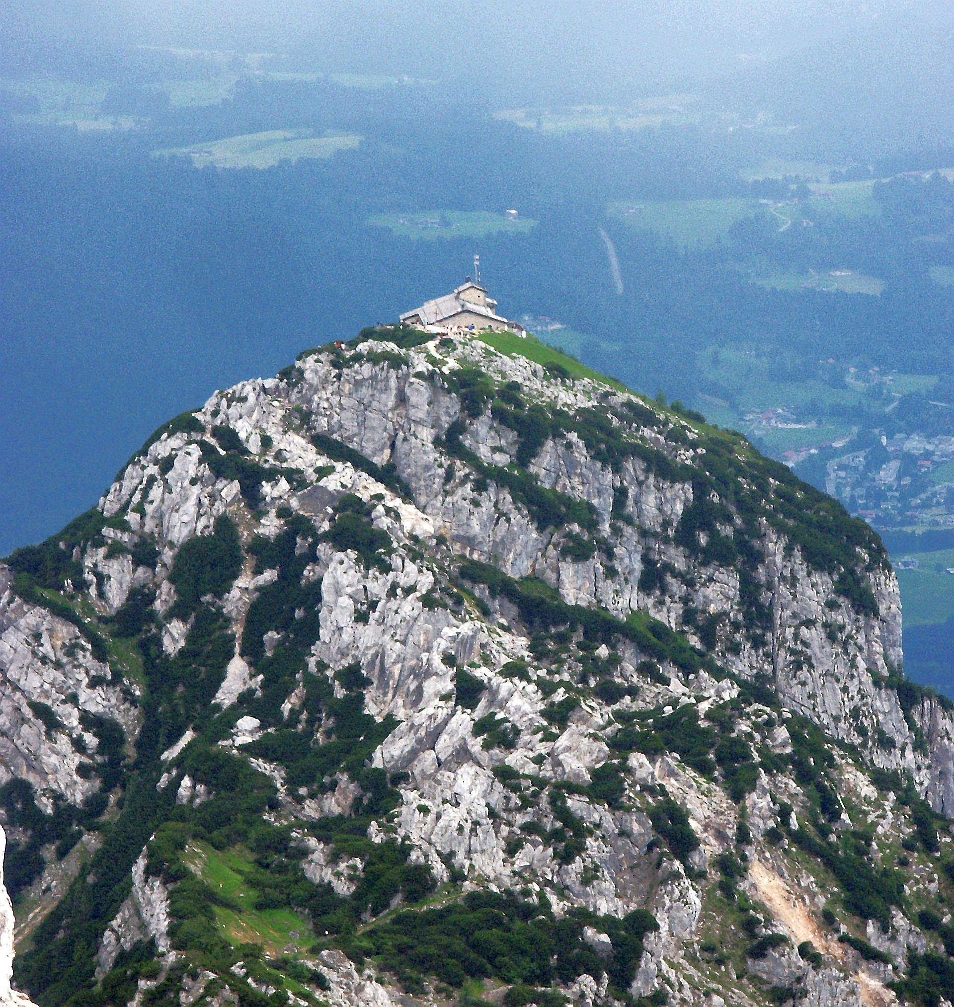 Blick zum Kehlsteinhaus von irgendwo zwischen Purtschellerhaus und Höhem Göll